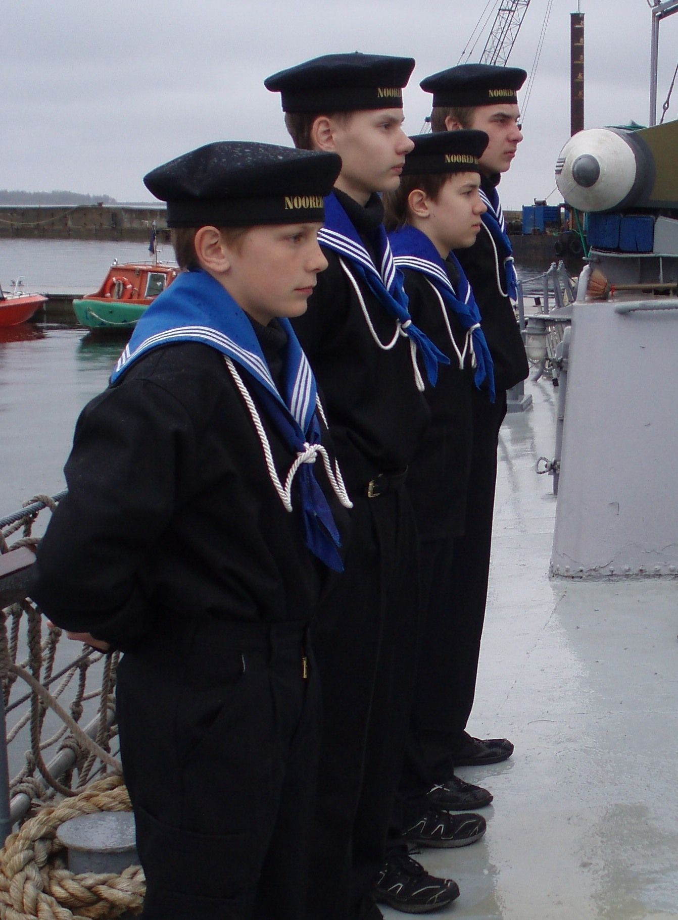 Kaitseliidu Noorte Kotkaste mereallüksuste liikmed rivis laeva tekil pidulikus vormis kevadel 2014.